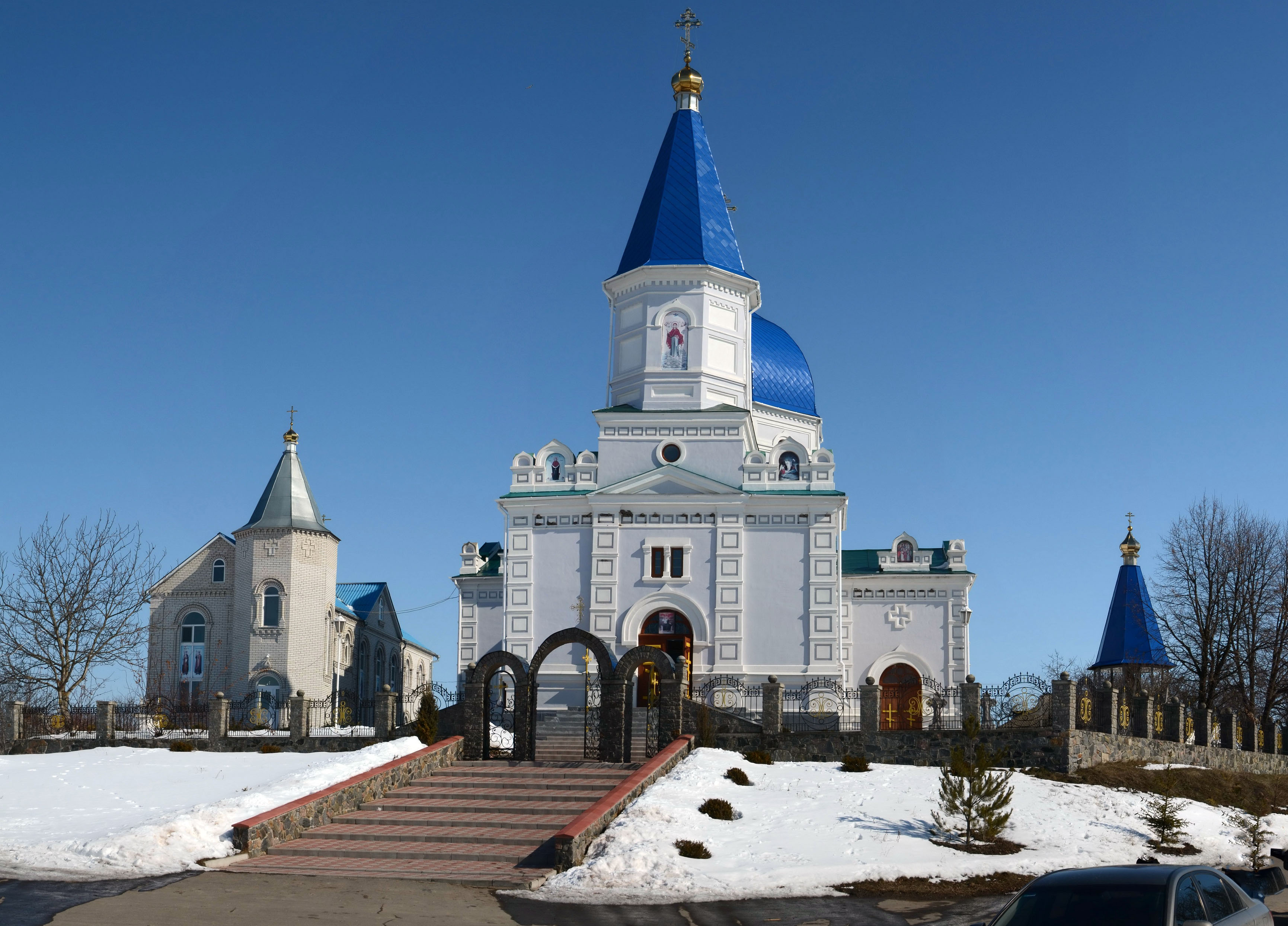 Рогівська церква св. Івана Богослова: Церква св. Івана Богослова